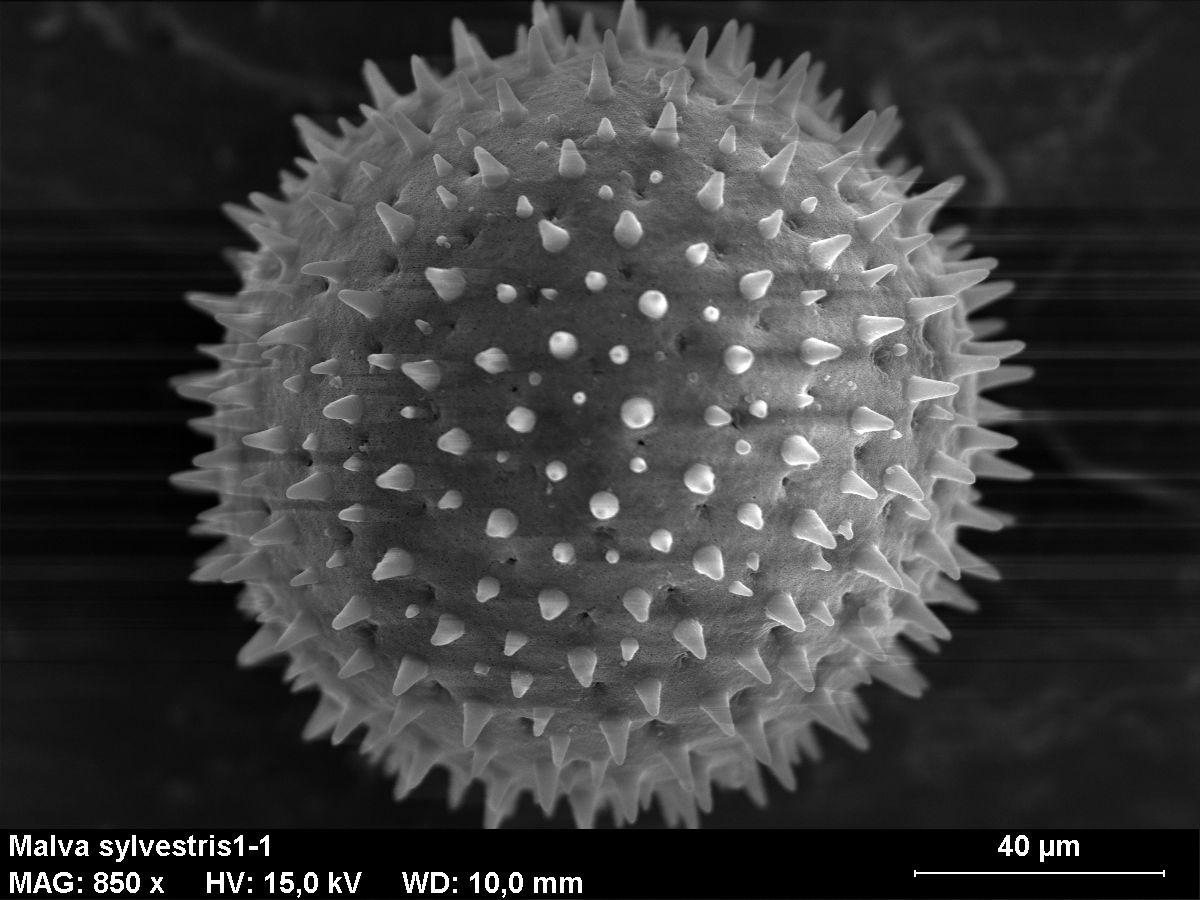 Malva sylvestris - Pollen (Rasterelektronenmikroskop)